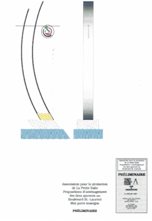 Essaye graphique de la demi-voile